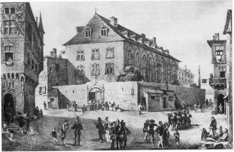 L'Hôtel-Dieu de Lyon à l'époque de Rabelais. Il s'élevait sur l'emplacement de la chapelle actuelle. Lithographie de H. Gaillard, 1847 Musée des Hospices Civils de Lyon